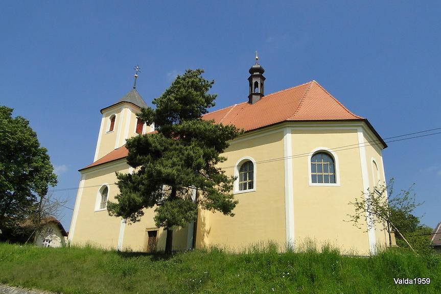 Kostel sv. Bartoloměje (Bohuslavice), Bohuslavice